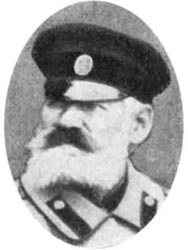 Мезенцев, Сергей Николаевич - депутат Государственной Думы Российской империи